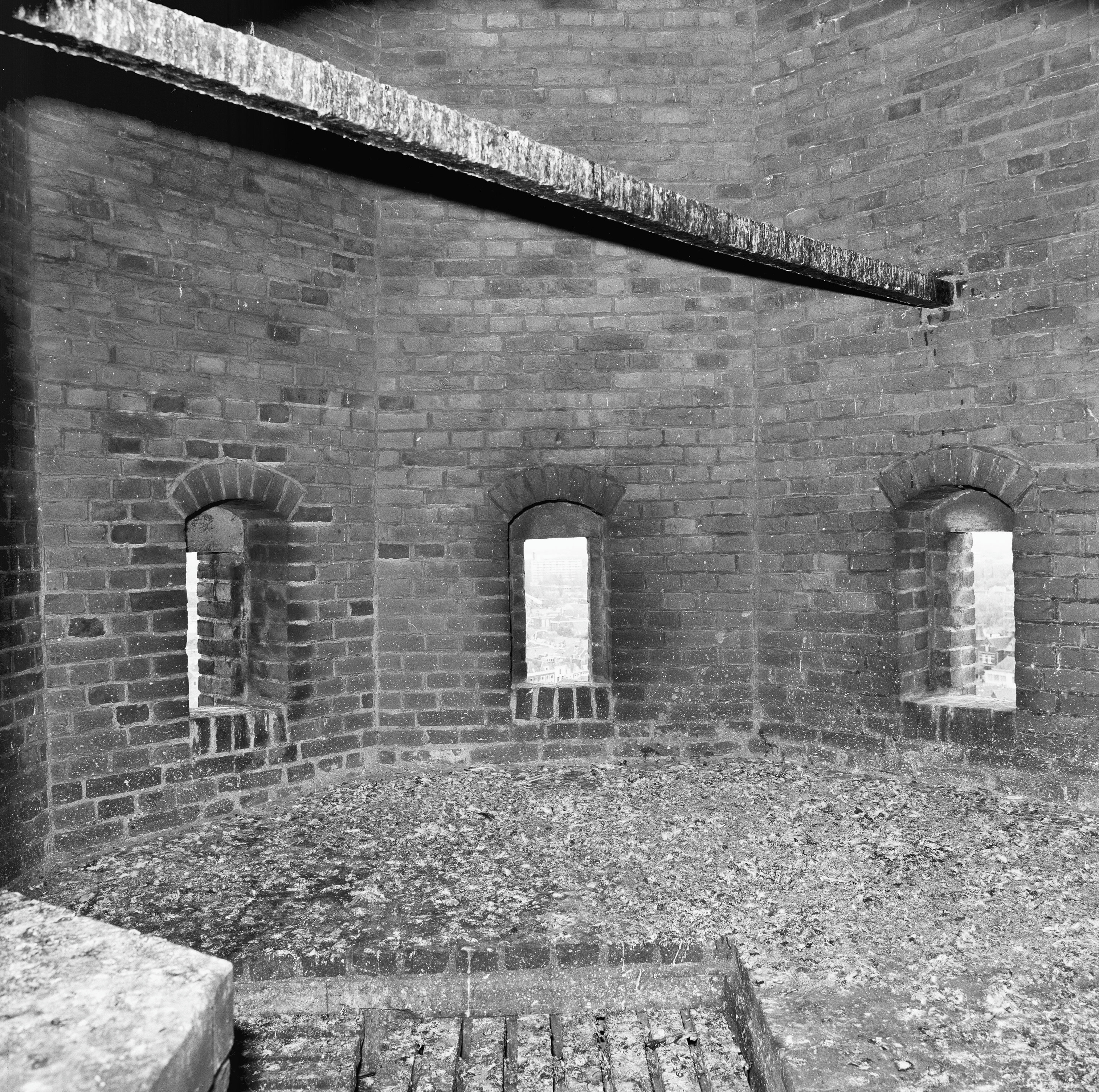 Oude Kerk: INTERIEUR, OVERZICHT HOEKTOREN